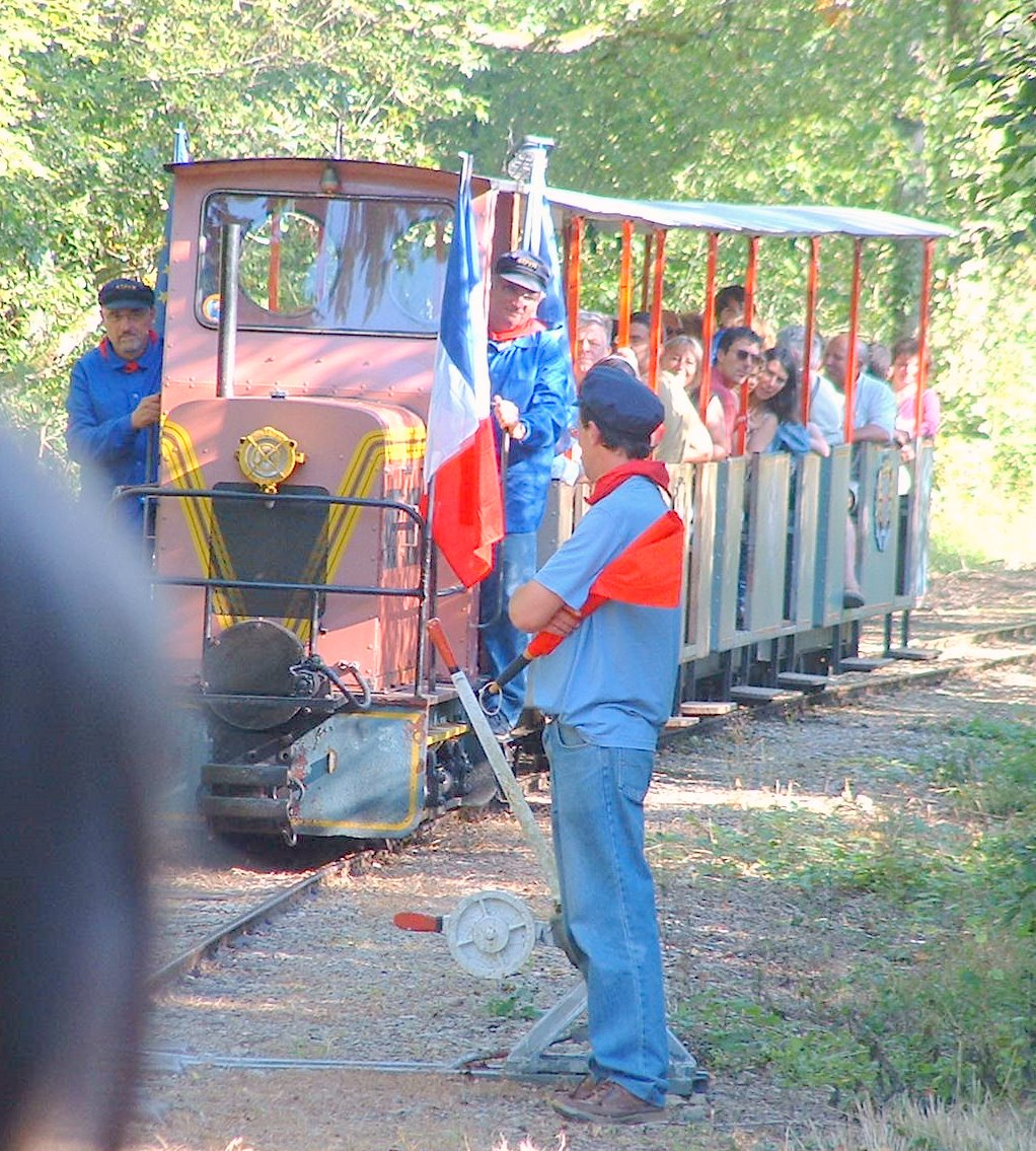 Petit train de l'Yonne (Massangis)